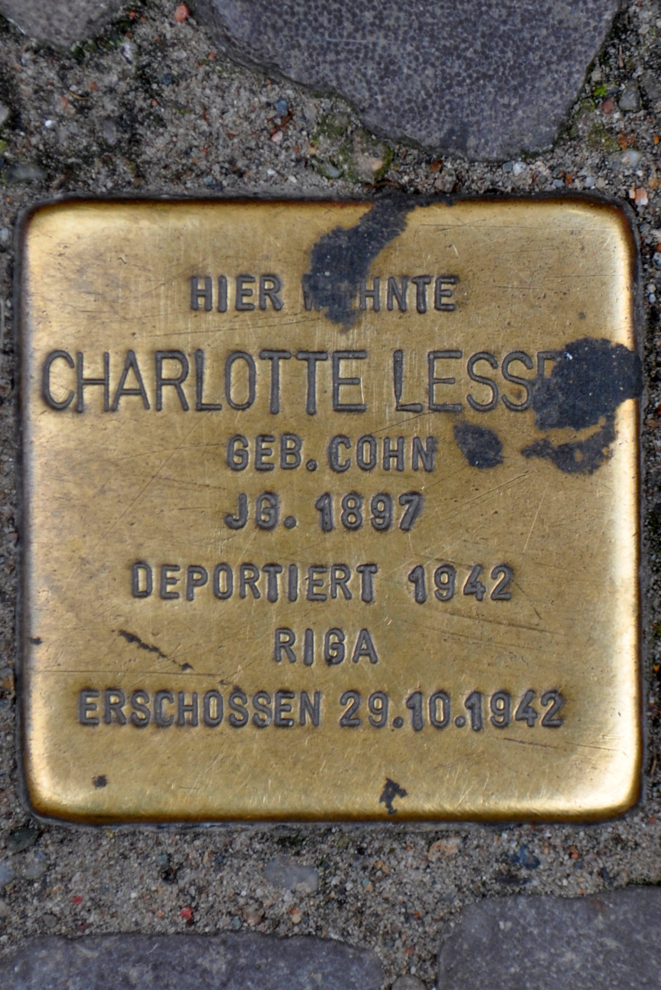 Stolperstein in Stralsund, Ossenreyerstraße 21/22. Der Stolperstein ist einer von fünf Stolpersteinen an dieser Adresse. Text: Hier wohnte Charlotte Lesser geb. Cohn Jg. 1897 deportiert 1942 Riga erschossen 29.10.1942